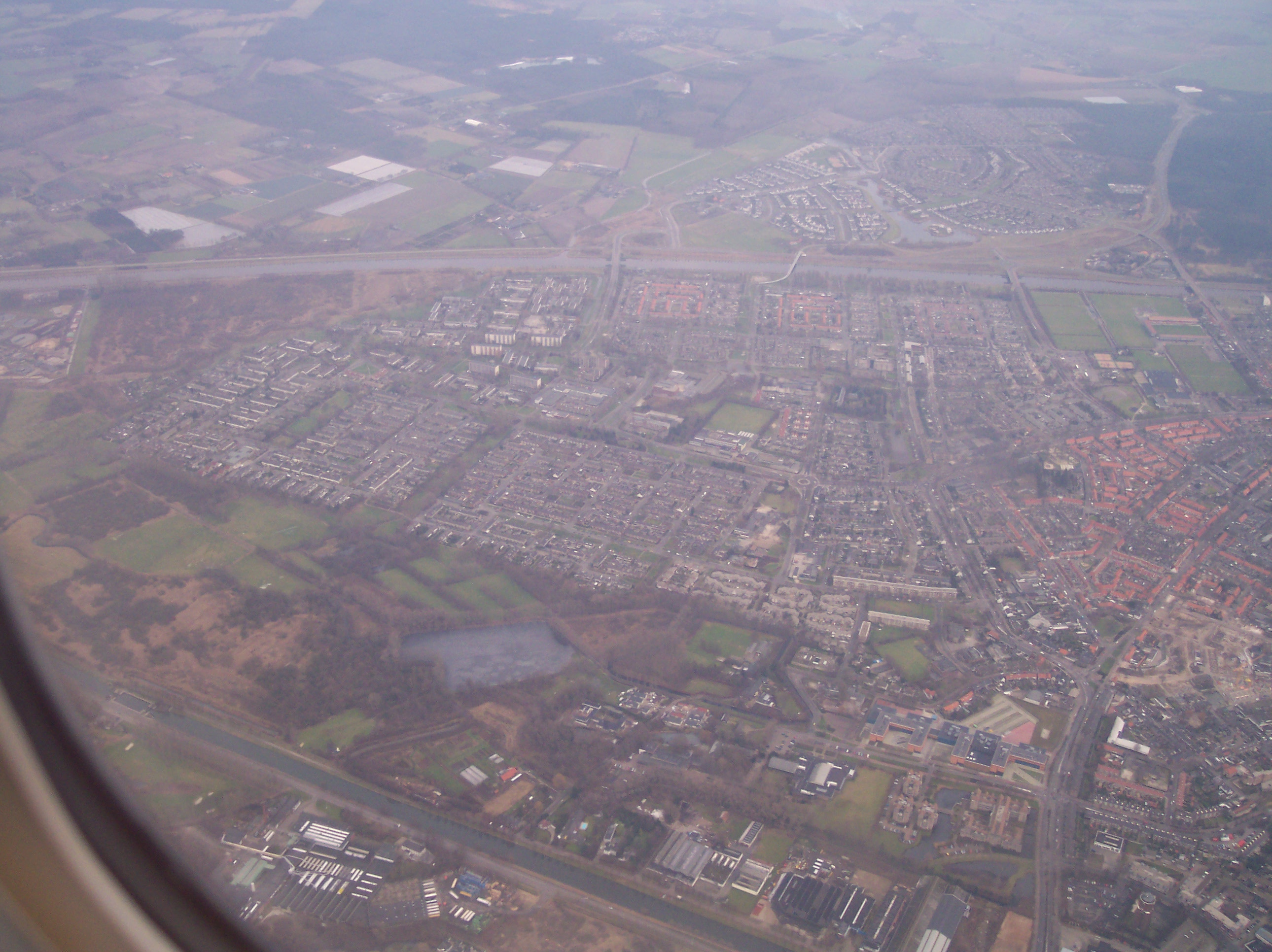 Helmond Noord, 29 januari 2005 Foto: Henri van Zeeland